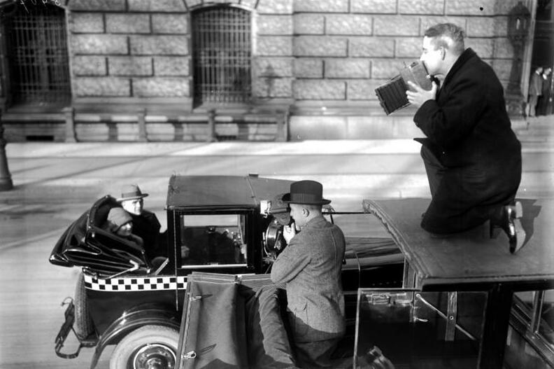 Der Beruf des Zeitungsfotografen ist einer der anspannensten, sowie aber auch interessantesten seiner Art. Stets mit der Kamera bewaffnet ist er ständig auf der Suche nach interessanten Objekten, um für den Leser wichtige Geschehnisse im Bilde, festzuhalten. Man findet den modernen Zeitungsfotografen überall, sei es zu wichtigen politischen Weltereignissen oder zu Geheimbesprechnungen großer Wirtschaftsführer, oder Ereignissen lokaler Natur stets wird er dabei sein mit den modernsten Apparaten der Neuzeit ausgerüstet bis zur Geheim-Aufnahme-Kamera. Ist die Aufnahme fertiggestellt, was oft unter größten Schwierigkeiten geschieht, so ist der schnelle Transport der Fotografien zur Redaktion seine zweite wichtige Aufgabe. Er benutzt zur schnellen Beförderung derselben die modernsten Verkehrsmittel wie Flugzeug, Auto, Expresszüge usw., ständig muß er auch vor seinen Konkurrenten auf der Hut sein , um nicht von denselben geschlagen zu werden. -Der Zeitungsphotograph bei der Verfolgung wichtiger Persönlichkeiten im Auto, welche er unbedingt auf die Platte haben muß. Ständig neben dem Automobil seines Objektes daherfahrend versucht er seine Zeitungsaufnahme zu machen.